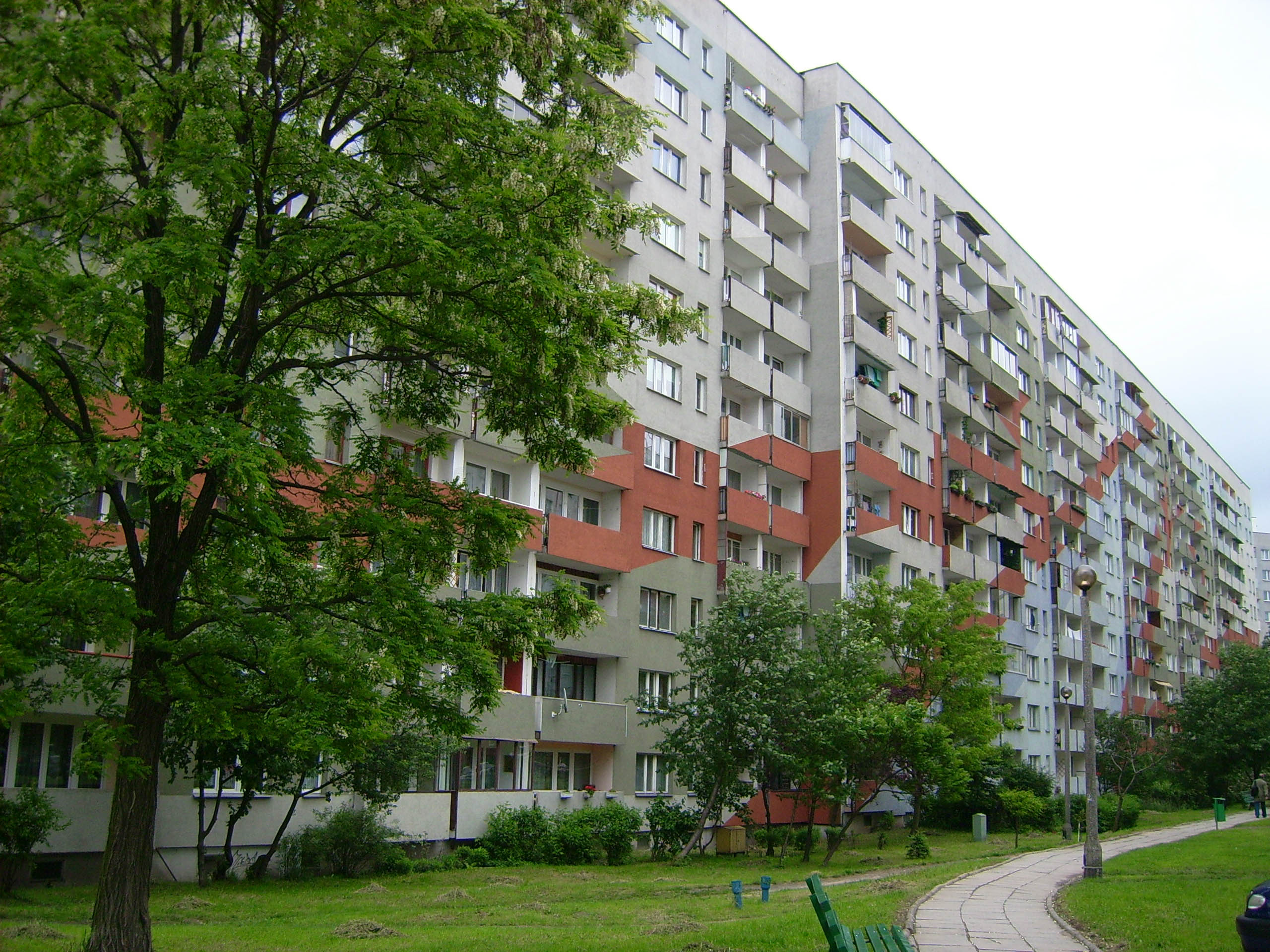 pl - blok mieszkalny Kraków Piaski Nowe, Polska en - block of flats Kraków Piaski Nowe, Poland author - Dar.k